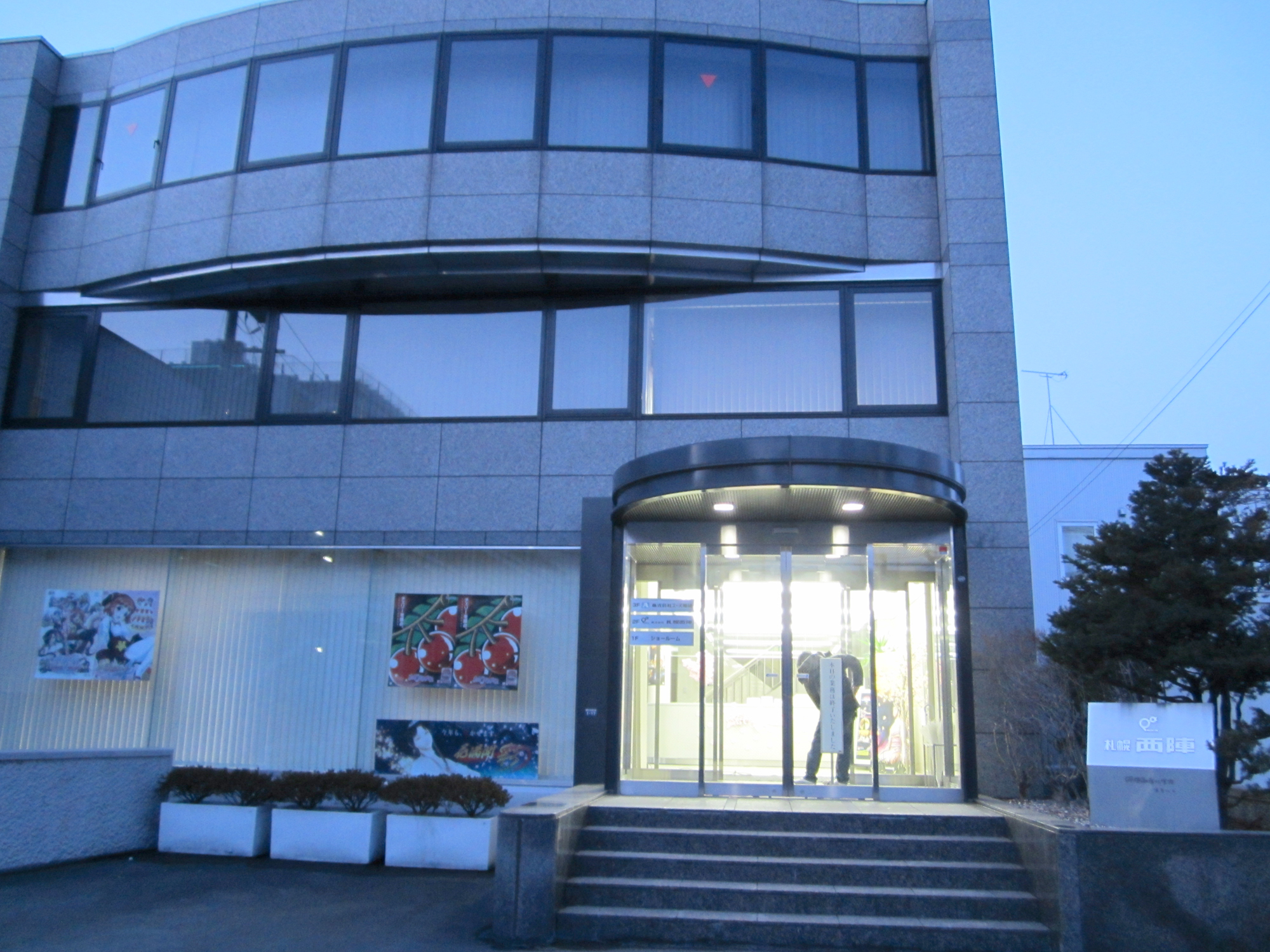 (株) 札幌西陣（北海道札幌市豊平区）